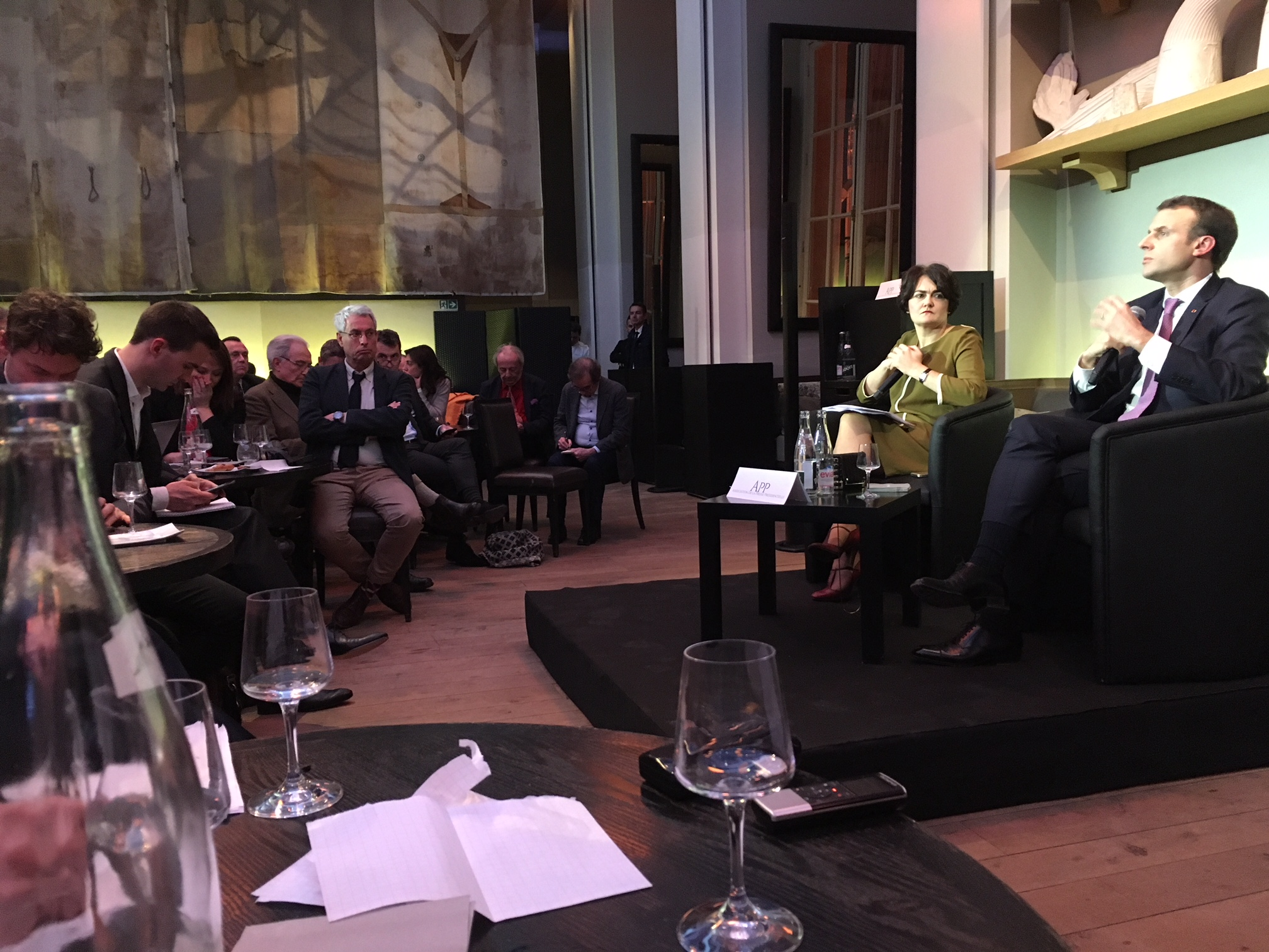 Echanges au mini Palais, annexe du Grand Palais, le 13 février 2018, entre le président Emmanuel Macron et les membres de l'Association de la presse présidentielle. Sur l'estrade, le président de la République Emmanuel Macron, et la présidente de l'association, Elizabeth Pineau